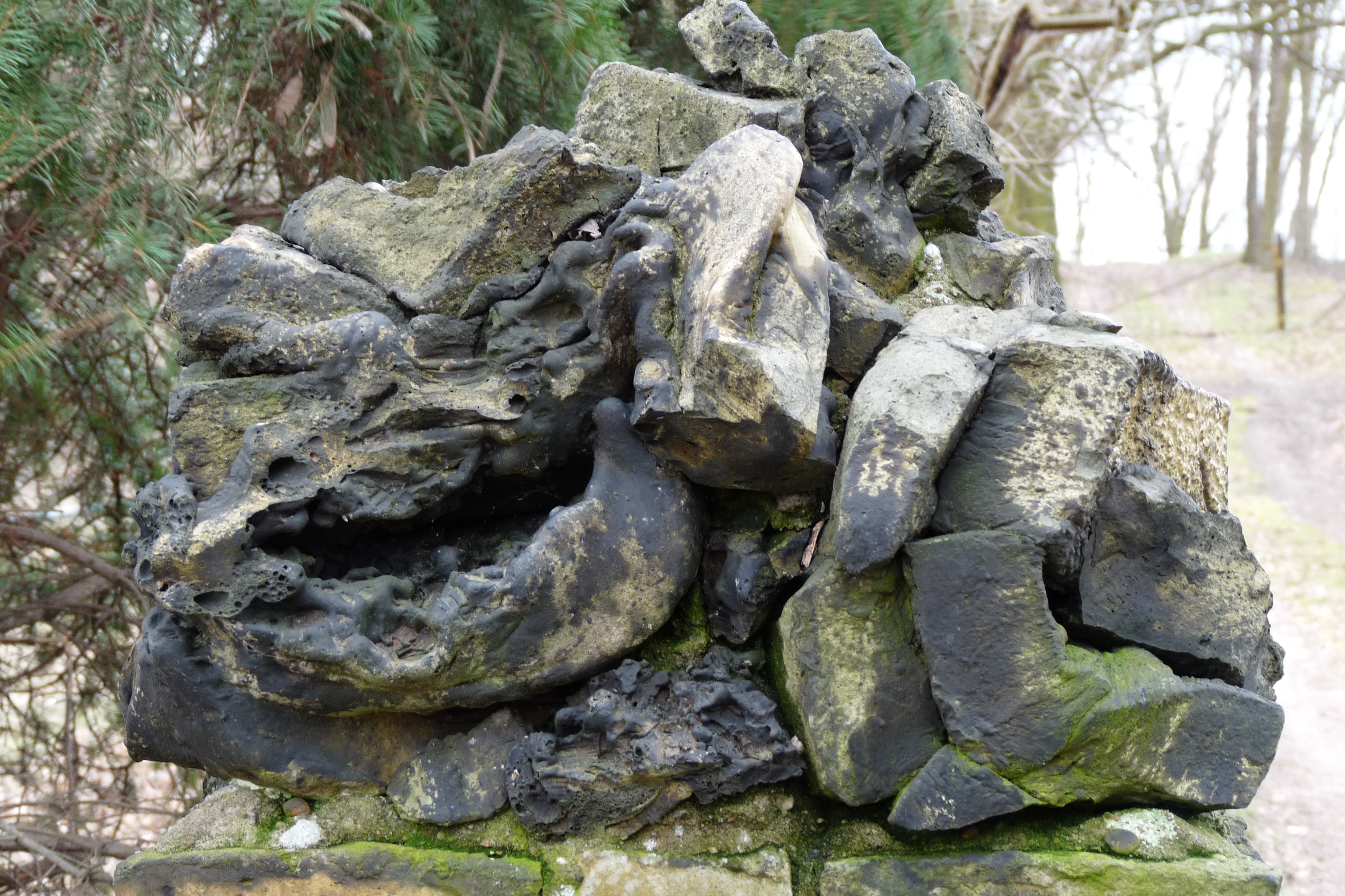 Als Schmolzziegel oder nur Schmolz werden Mauerziegel bezeichnet, die durch Fehler beim Brennvorgang entstanden sind. Sie gehören zu den Fehlbrandziegeln, hier als Schmuckelement auf alten Torpfeilern vor der Ruine der Holländer Mühle in Petzow, einem OT von Werder (Havel).